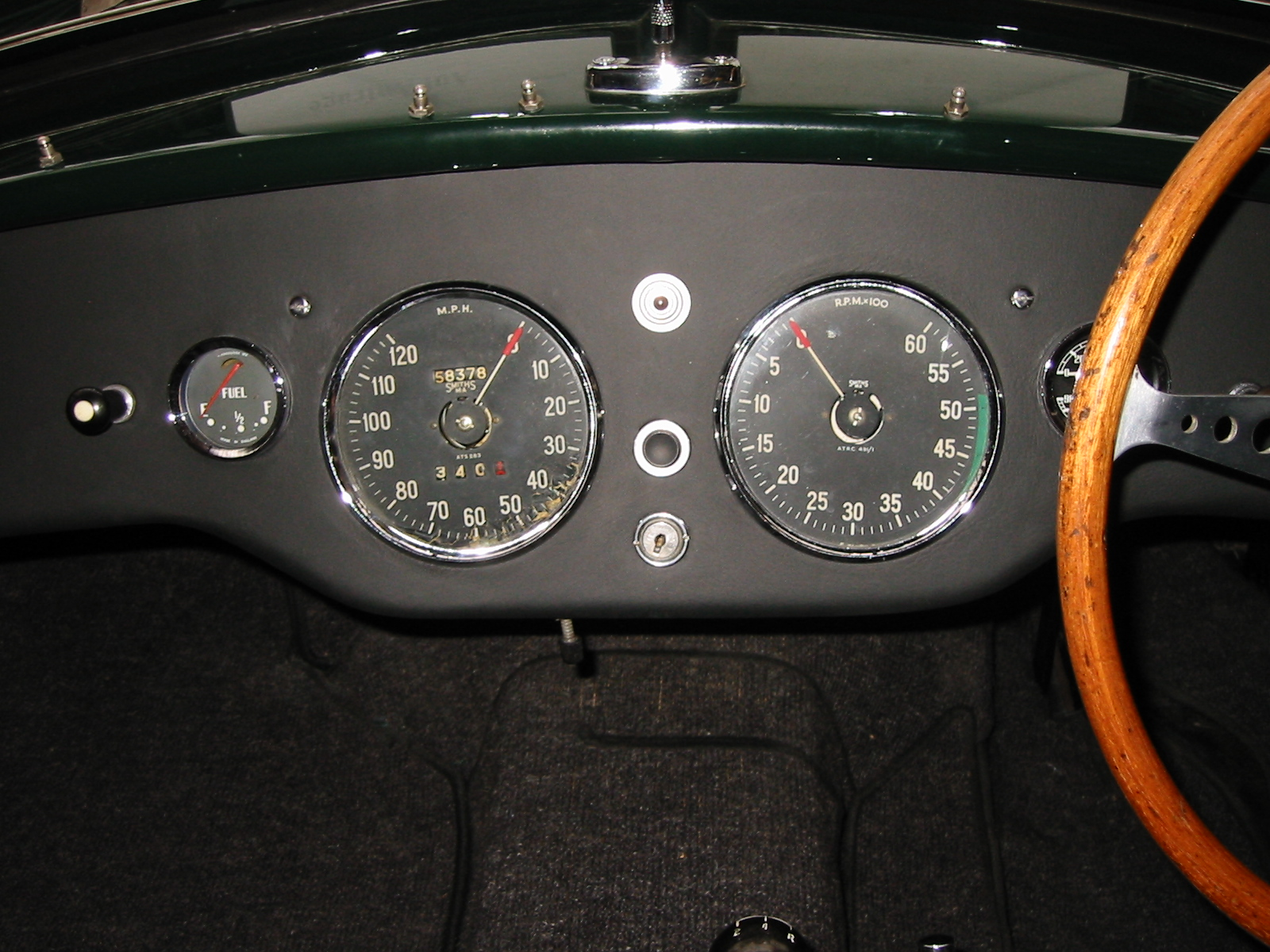 'Aston Martin DB1 SPA' Paul Jackman Special 1953/48, Frühjahr 2010 im Meilenwerk Berlin.